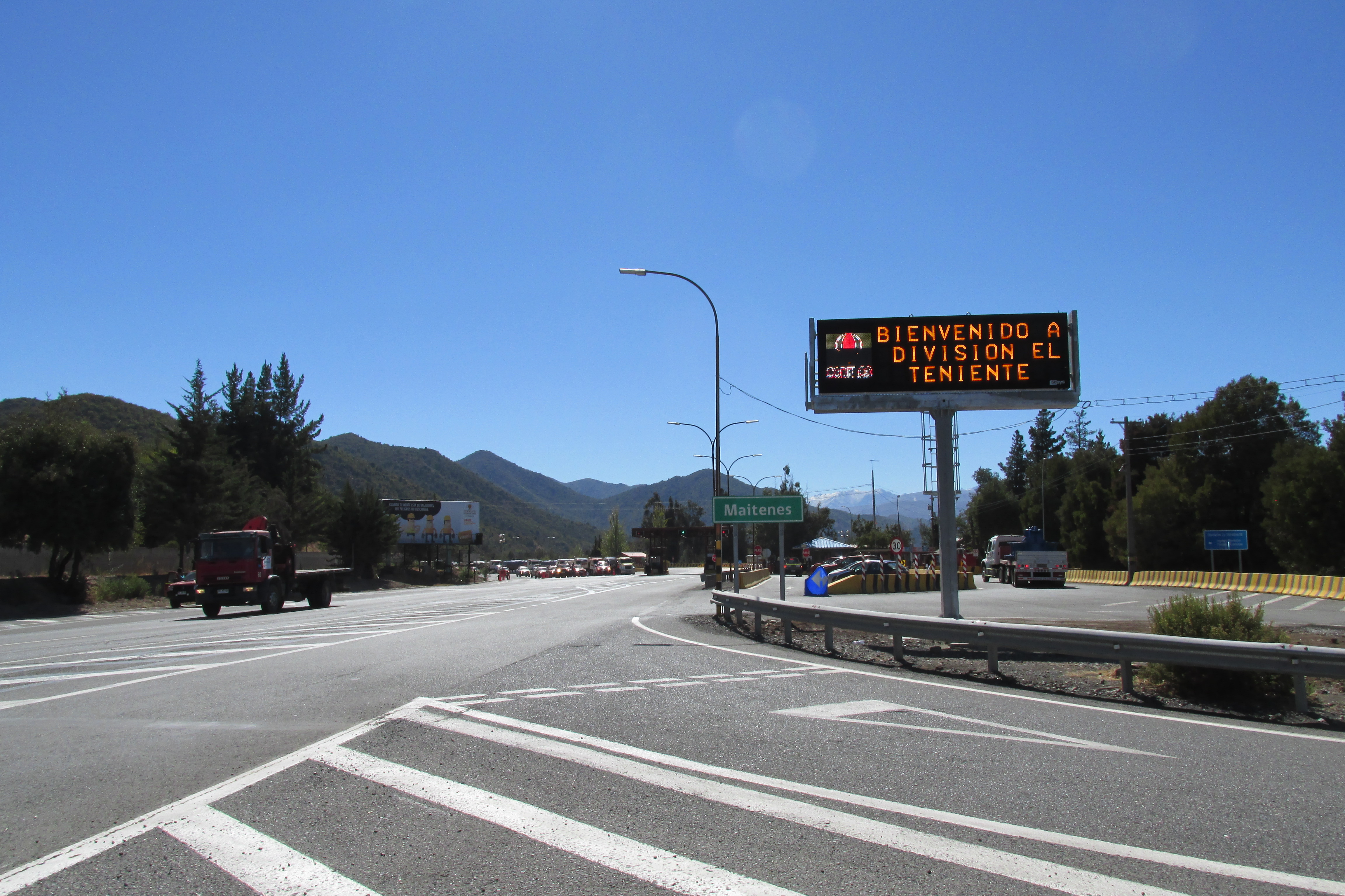 Entrada Al Mineral El Teniente de Codelco Chile